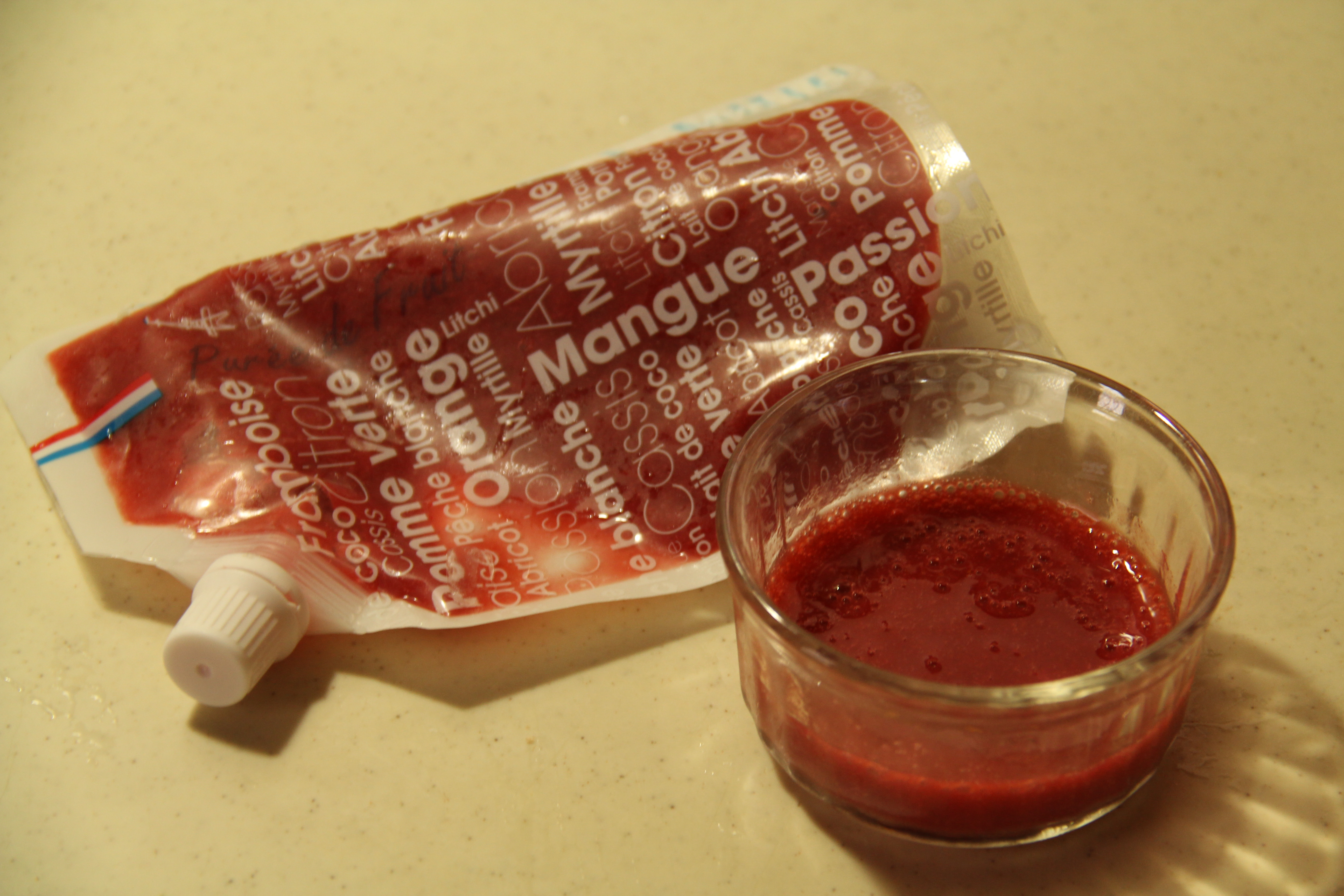 strawberry puree